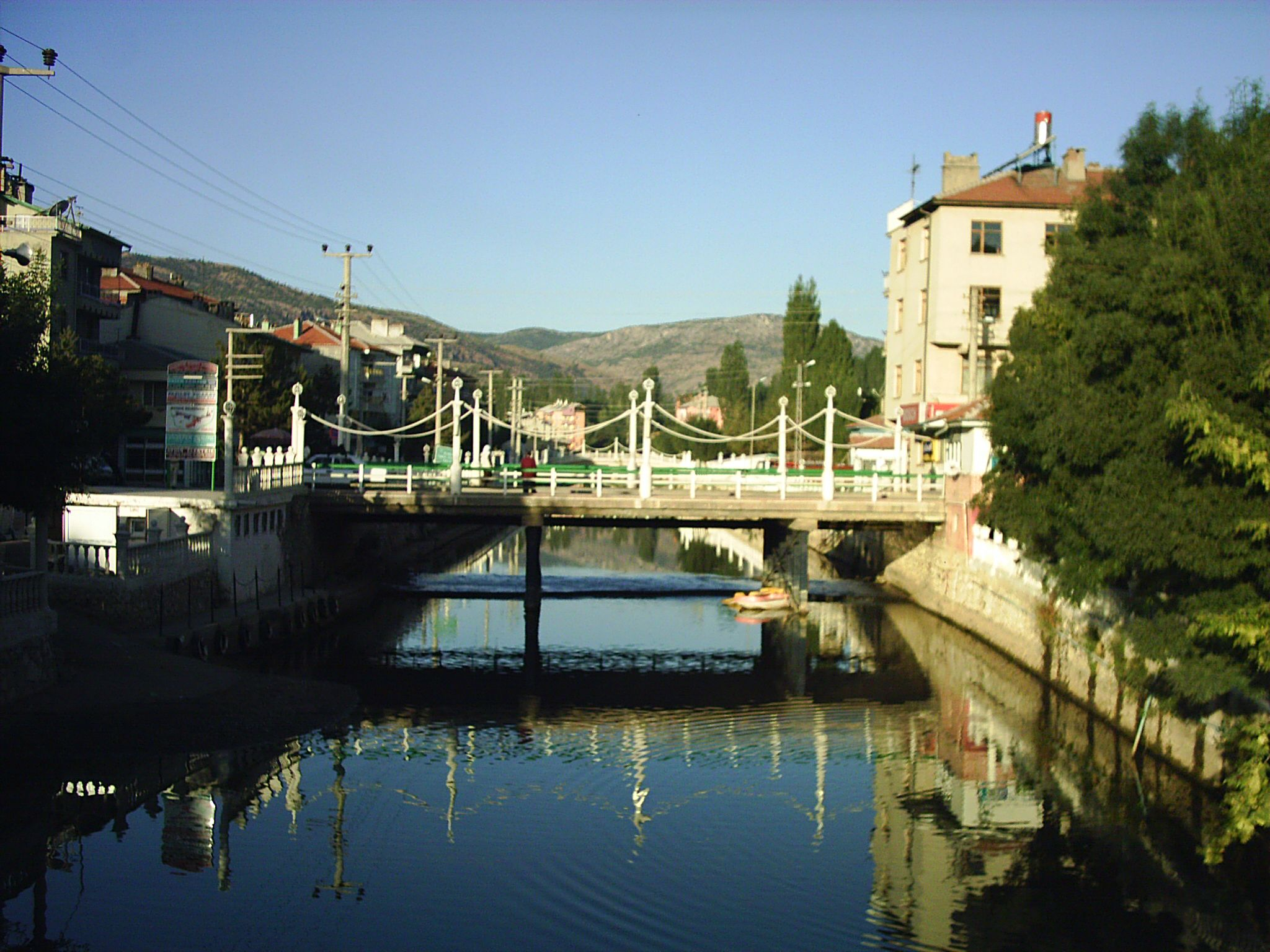 2006 yılında benim tarafımdan çekilmiştir. (A scene from Bozkır, Konya, Turkey, photo by Mustafa Navruz).